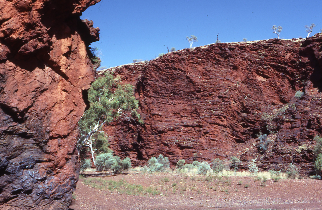 Gorges autour de Newman